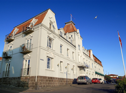 Billede af Strandhotellet i Sandvig på Bornholm